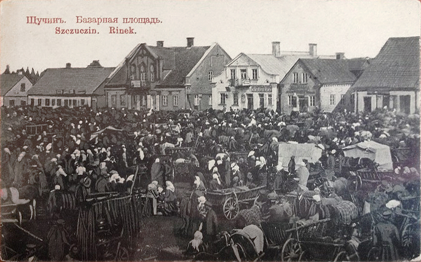 Беларуская (тарашкевіца): Шчучын (Ščučyn), пляц Рынак (plac Rynak). Традыцыйная гістарычная назва як перакладная ў подпісе